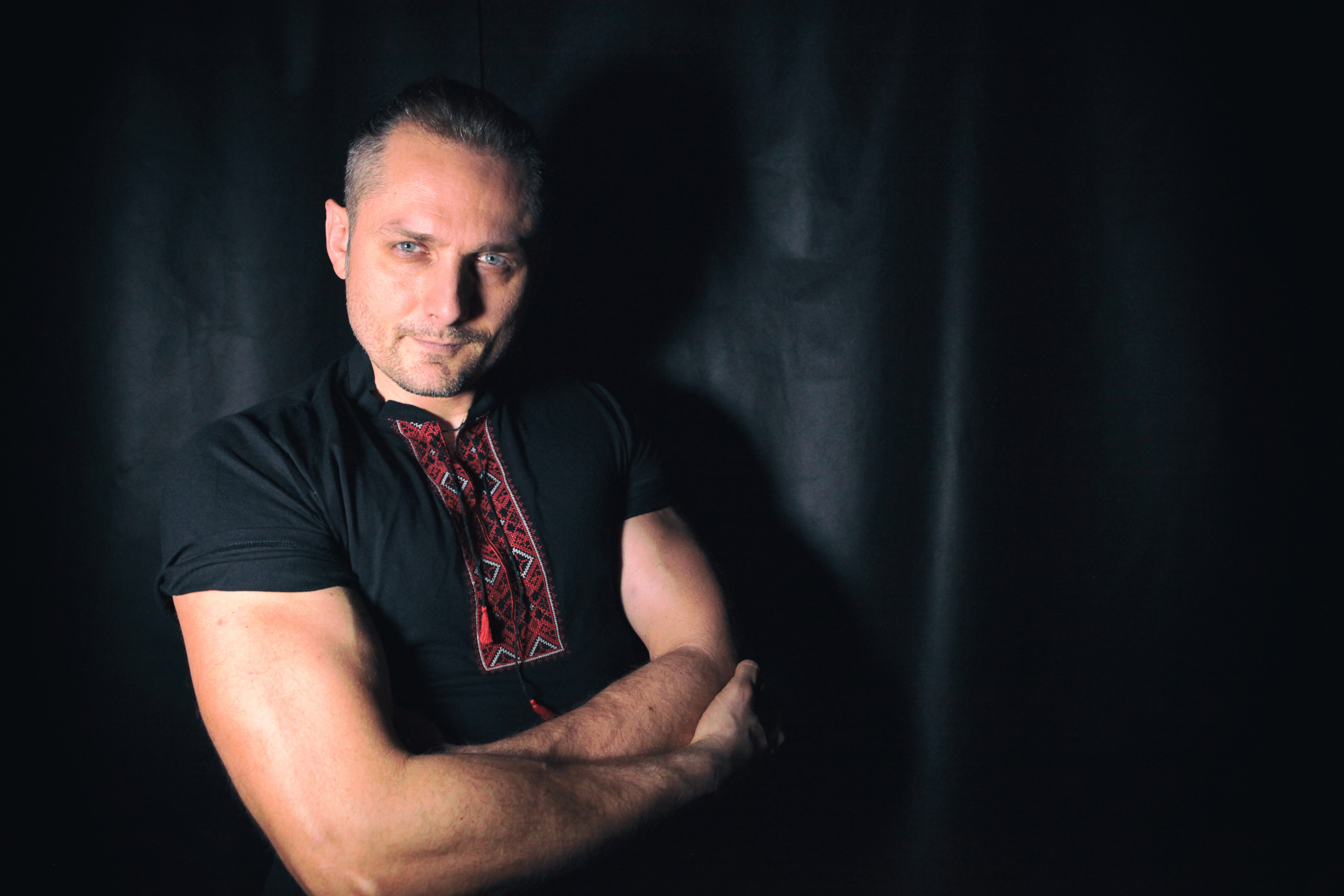 Співак Назар Савко у вишиванці